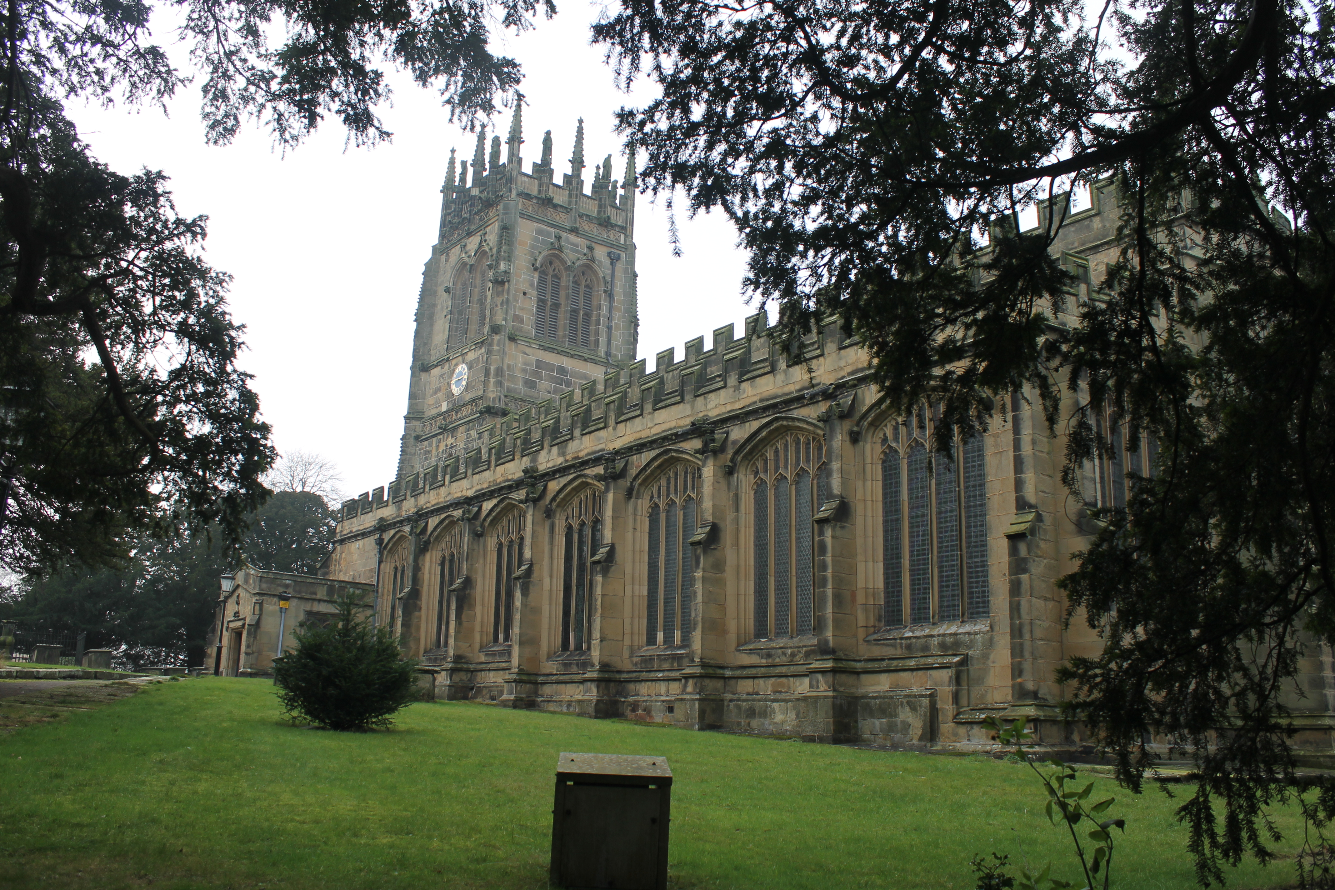 Eglwys yr holl seintiau, Gresffordd.